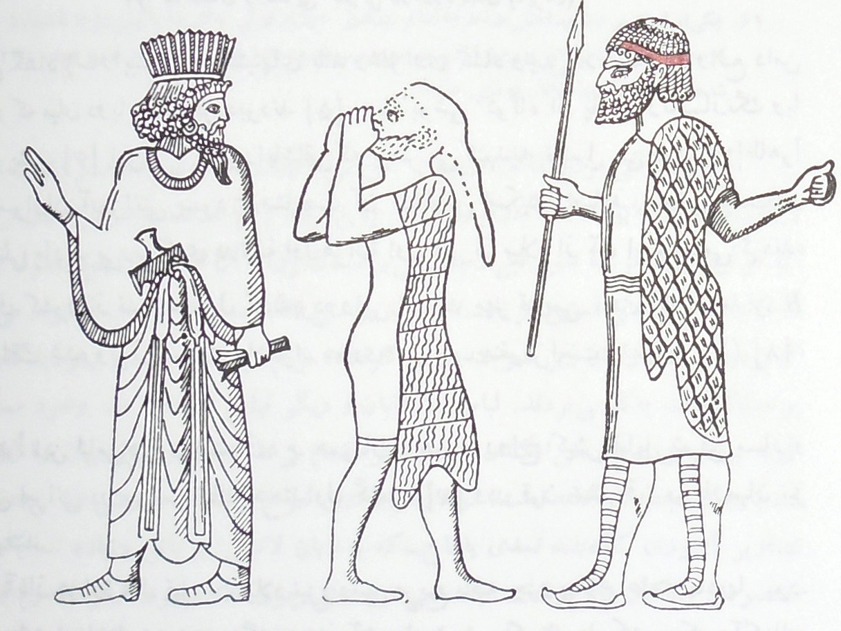 پوشاک ساکنان سرزمین ماد از هزارهٔ سوم تا قرن پنجم پ. م.